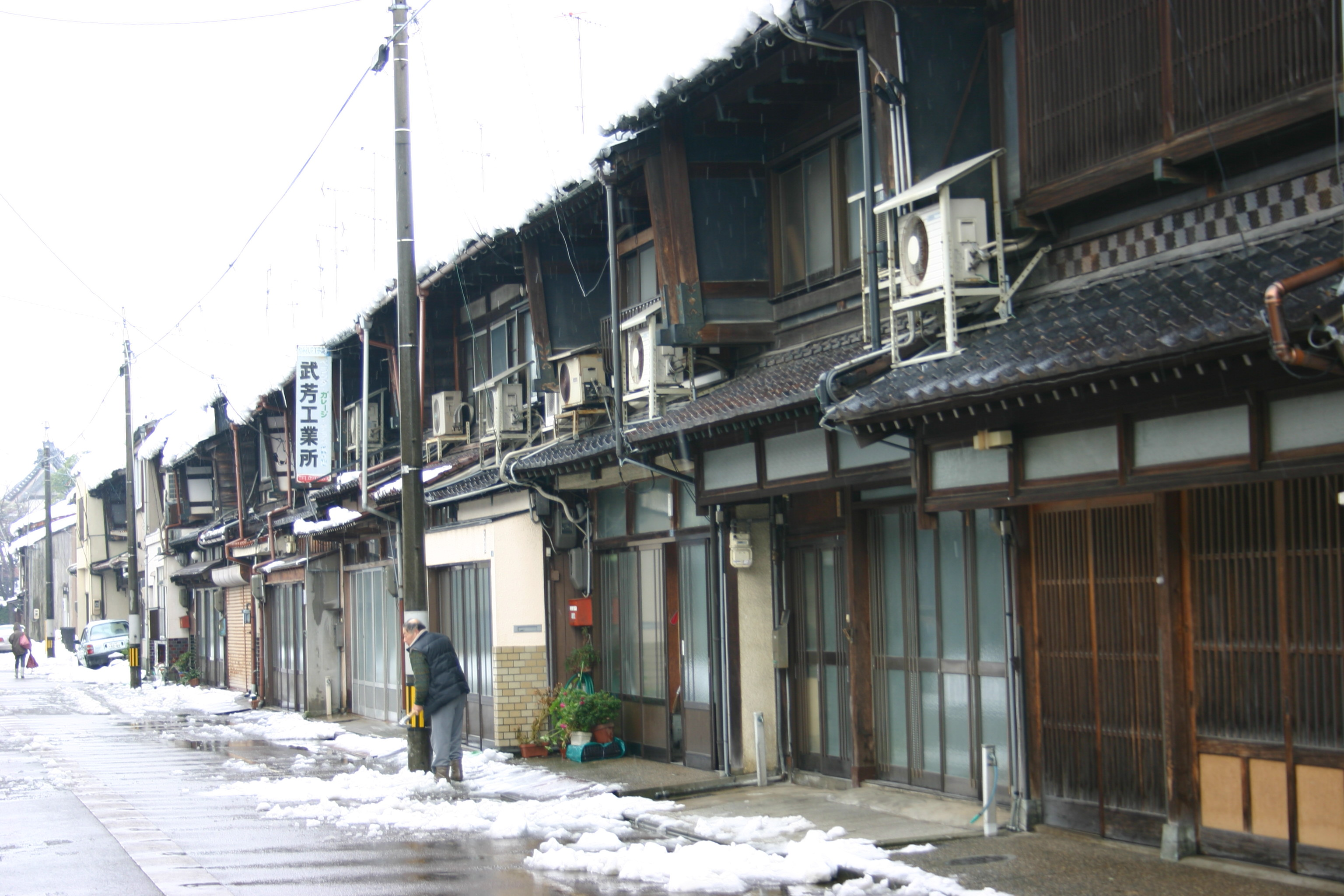 The old town of Komatsu city in Japan. 工業・空港の町として見られることの多い小松市だが、名所旧跡も多い。 小松市中心部から加賀市動橋(いぶりばし)までの旧北国街道沿いには、約10kmにわたって往事を偲ばせる町並みが比較的良く残っている。旧街道の町並みとしては北国街道随一、全国でも指折りの規模だろう。 また、小松市市役所周辺は小松城の城下町の風情が広範囲にわたってよく残っている。 大変貴重な景観ではあるが、残念ながら地元での認識はいま一つで、これらは観光スポットと言えるほどの整備はされていない。日本語版ja:Wikipedia:小松市から引用。Writen by user:pipimaru or others.